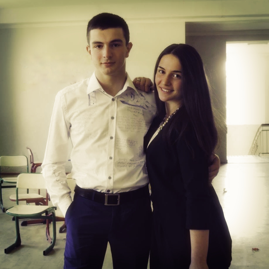 ილიაუნი. 2016 წელი.